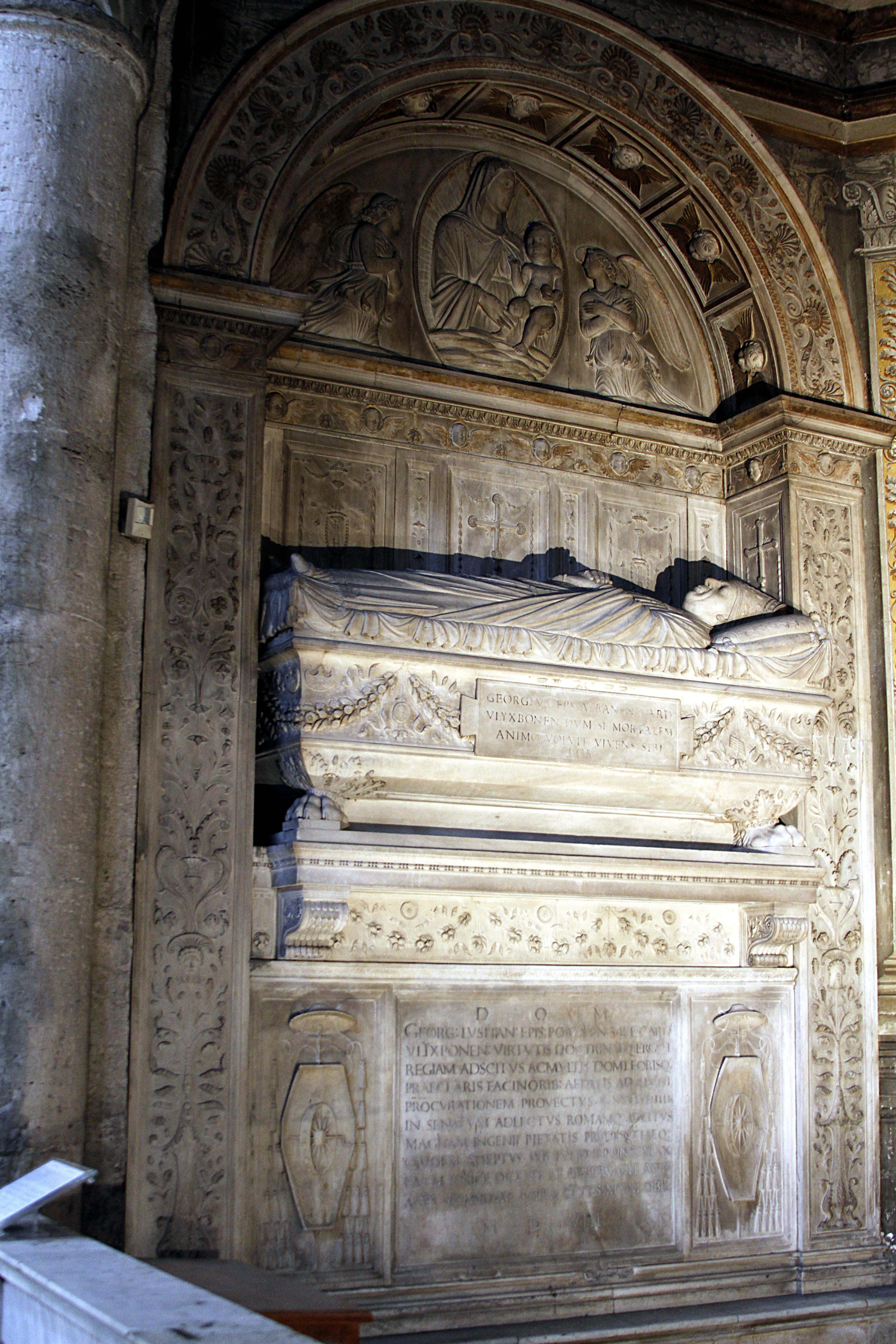 Santa Maria del Popolo - Rome